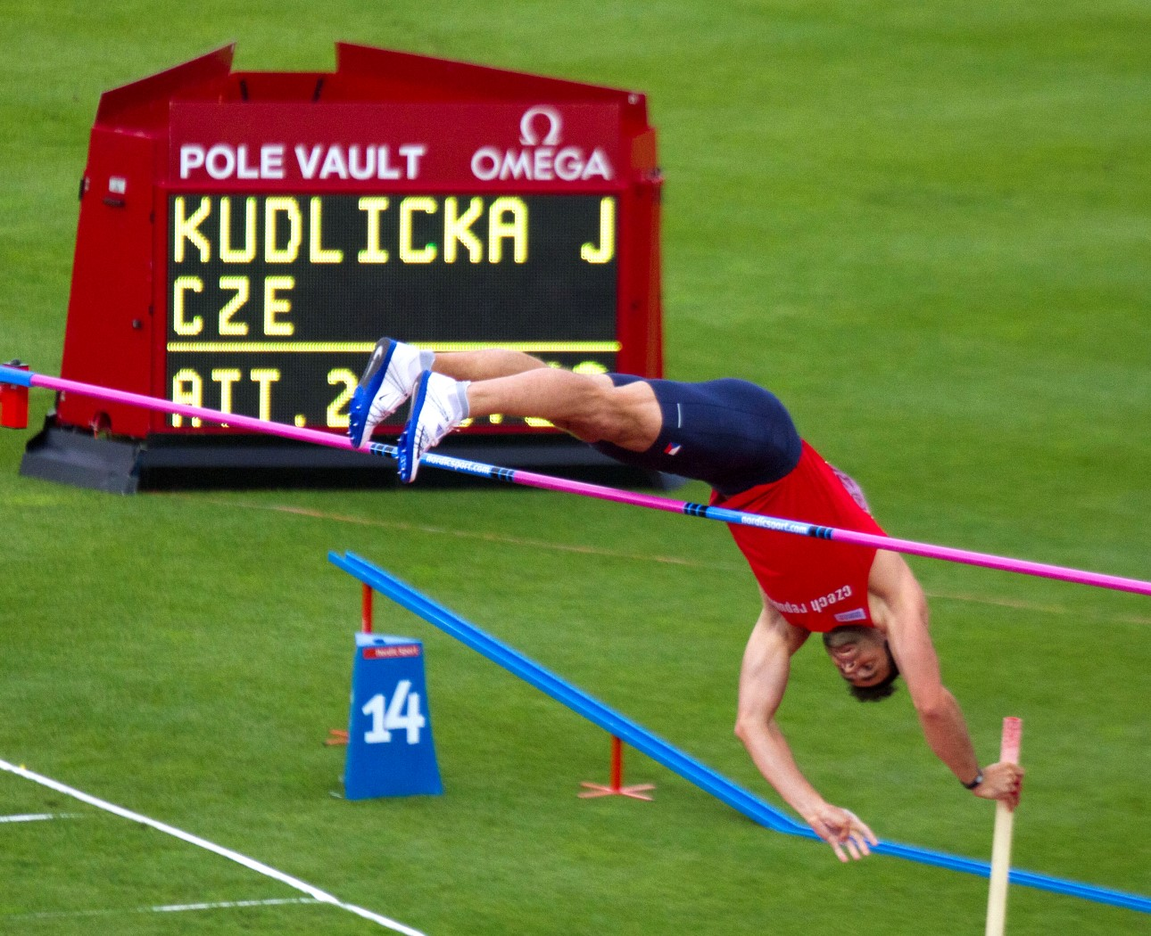 5210 kudlicka polsstok finale